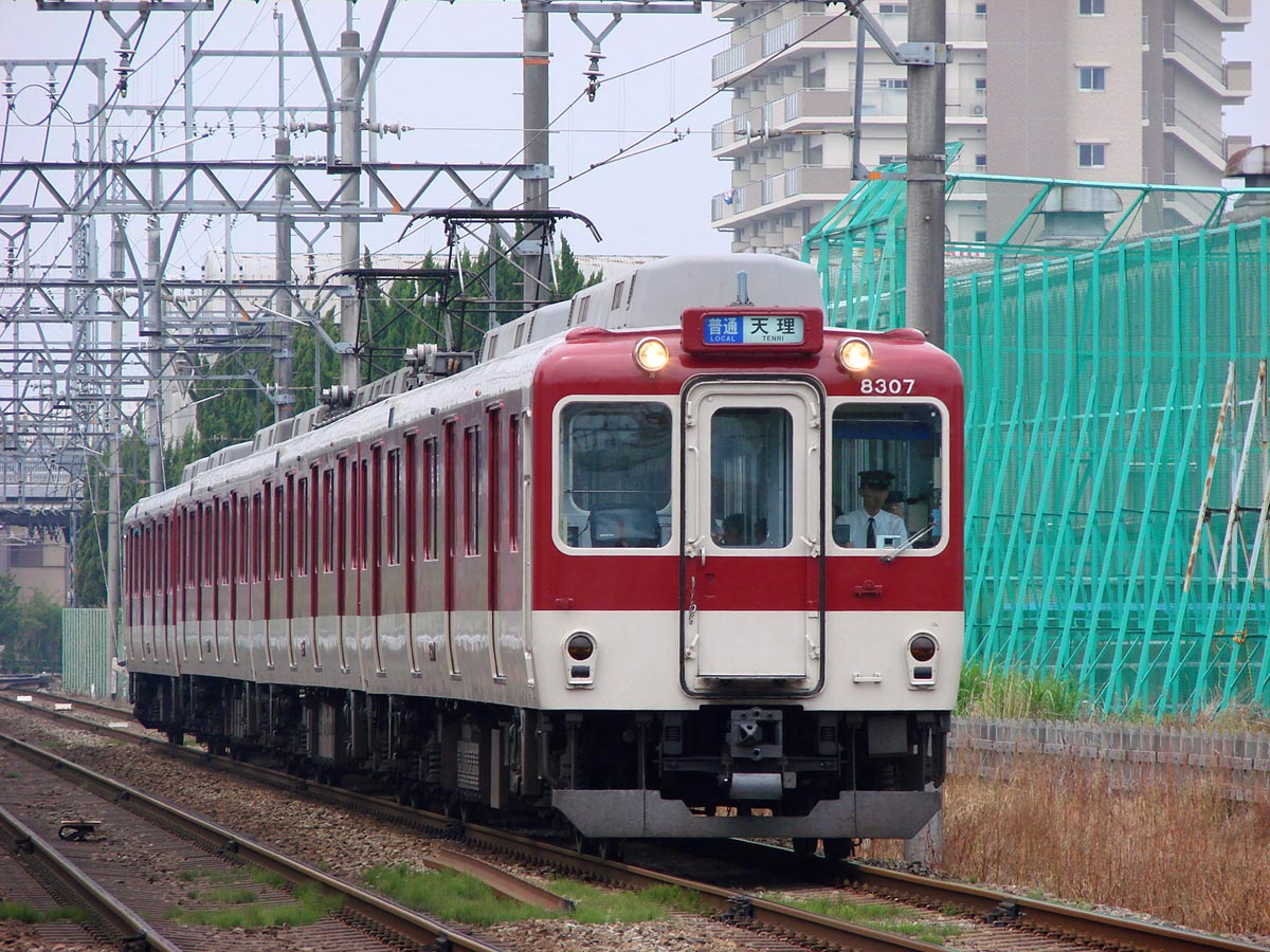 近鉄 8400系